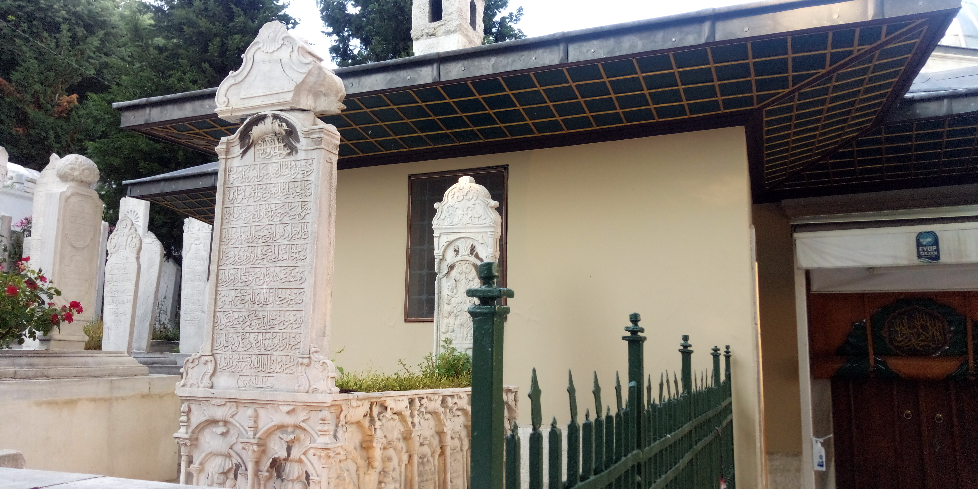 Saliha Sultan'ın Eyüp Sultan'da Yer Alan Mezar Taşı